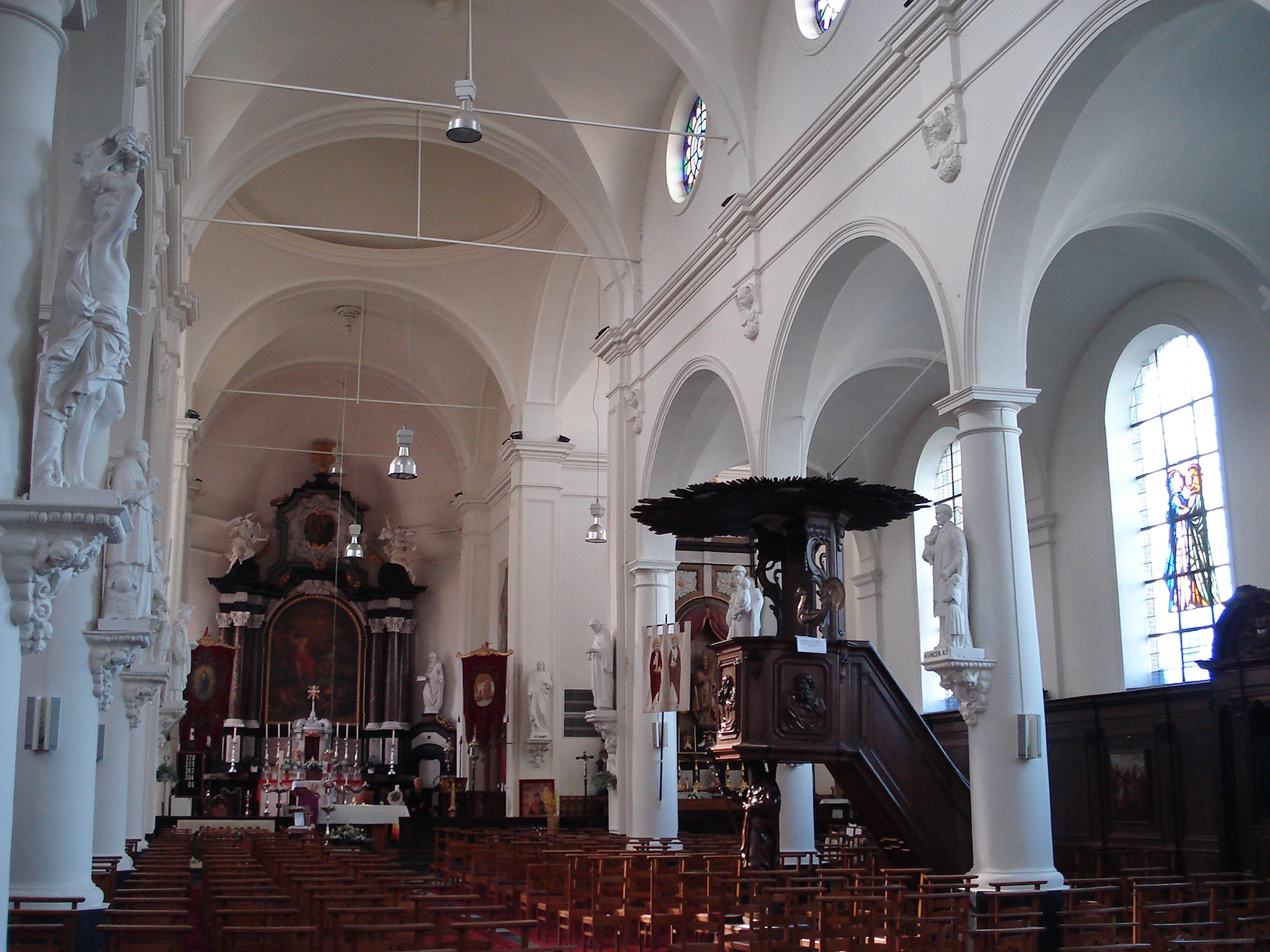 Doel, gem. Beveren. Neoklass. kerk, binnenaanzicht richting koor.